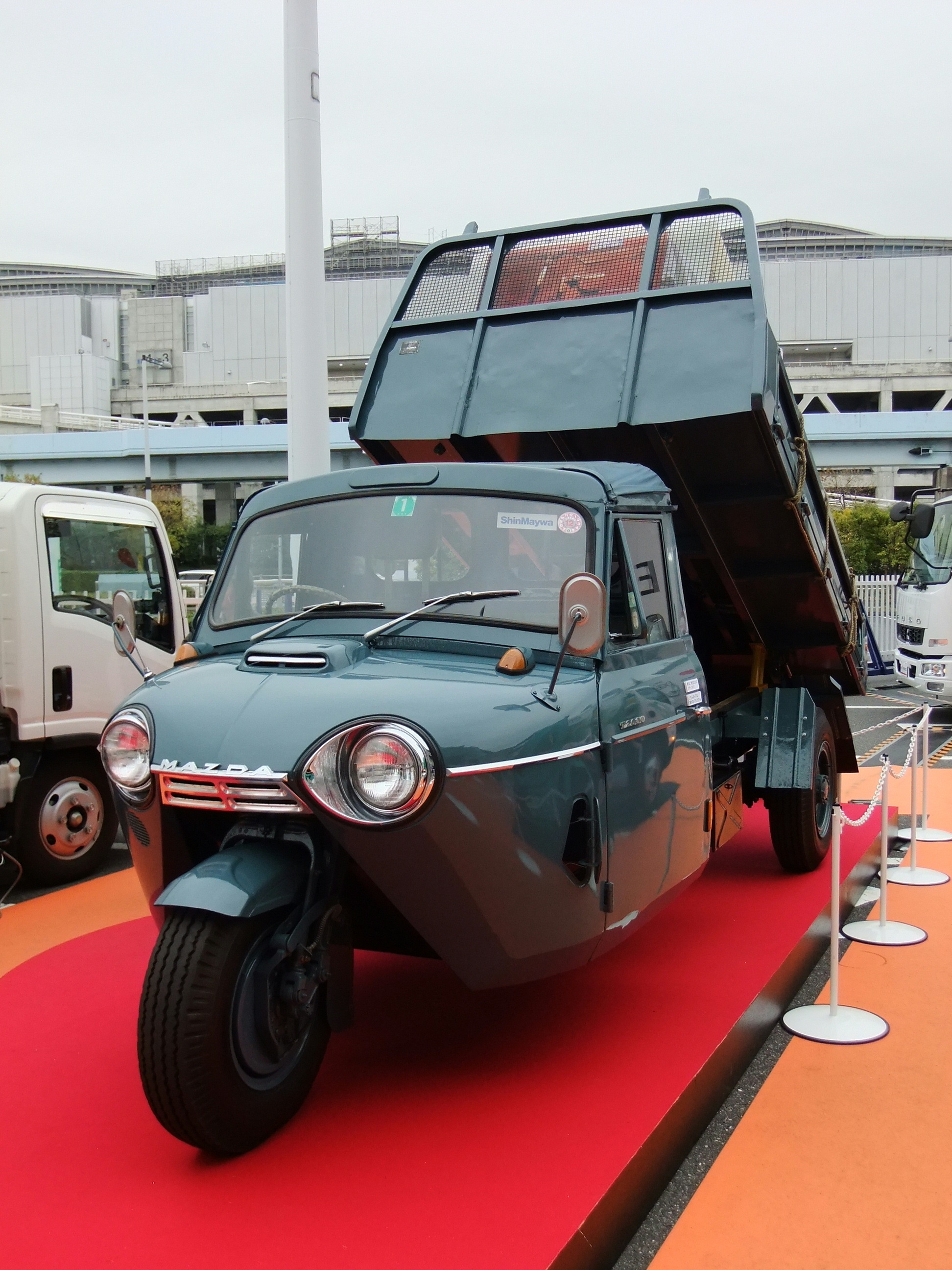 新明和工業（株）の前身、川西・三輪ダンプトラック，マツダ・T2000